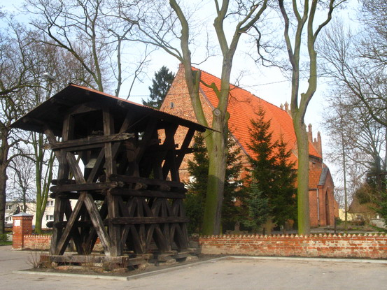 Dzwonnica przed kościołem w Krzyżanowie